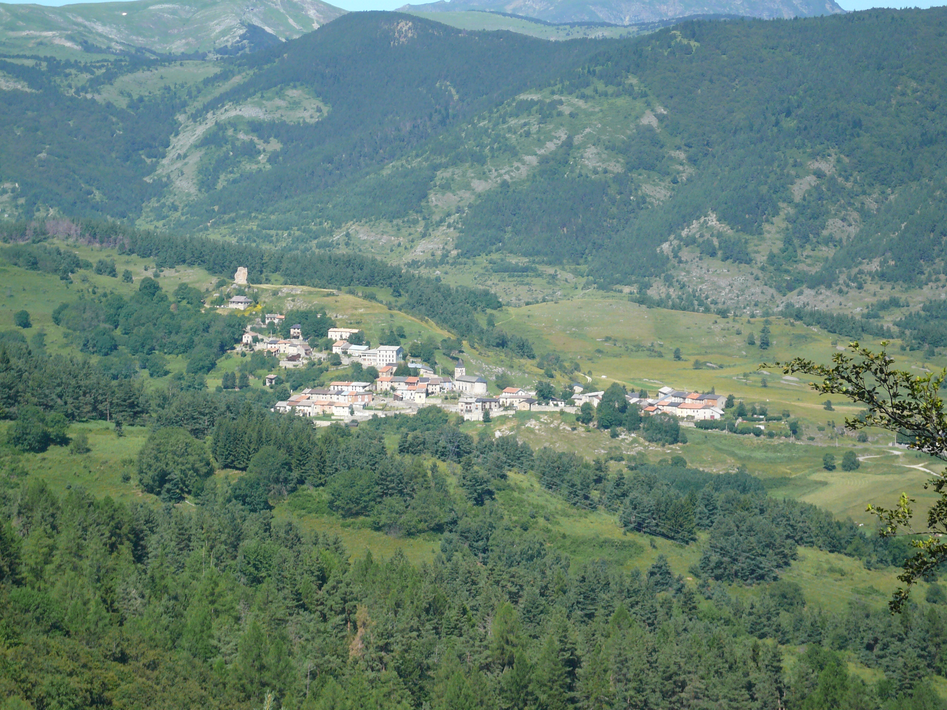 Vue du village de Montaillou dominé par son château fort (Ariège, Midi-Pyrénées, France). Photo prise de la route départementale n°1020 (commune de Camurac, Aude, Languedoc-Roussillon, France).